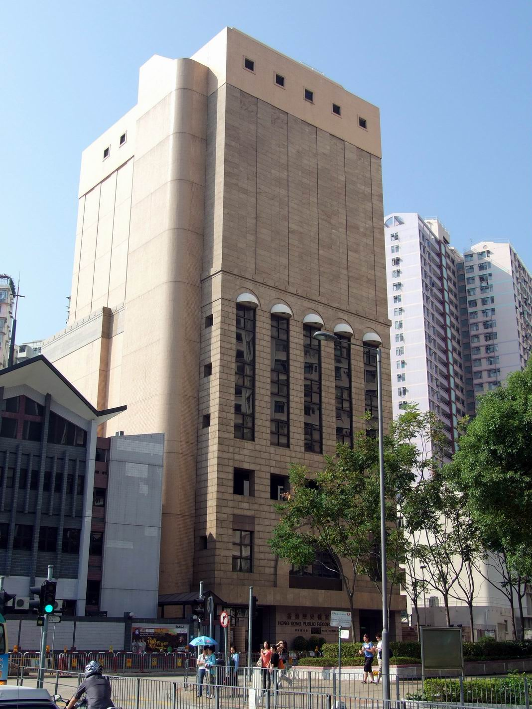 香港歷史檔案大樓